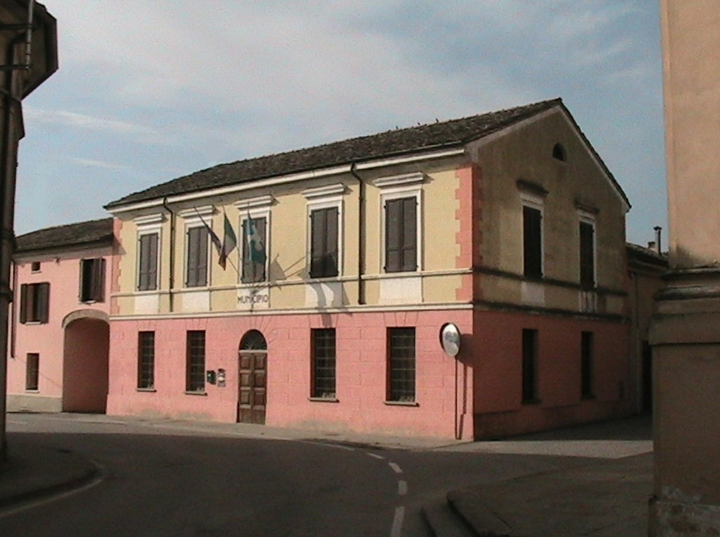 Drizzona - Municipio